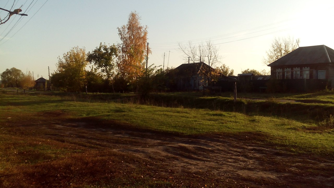 Осень в поселке Свияжный